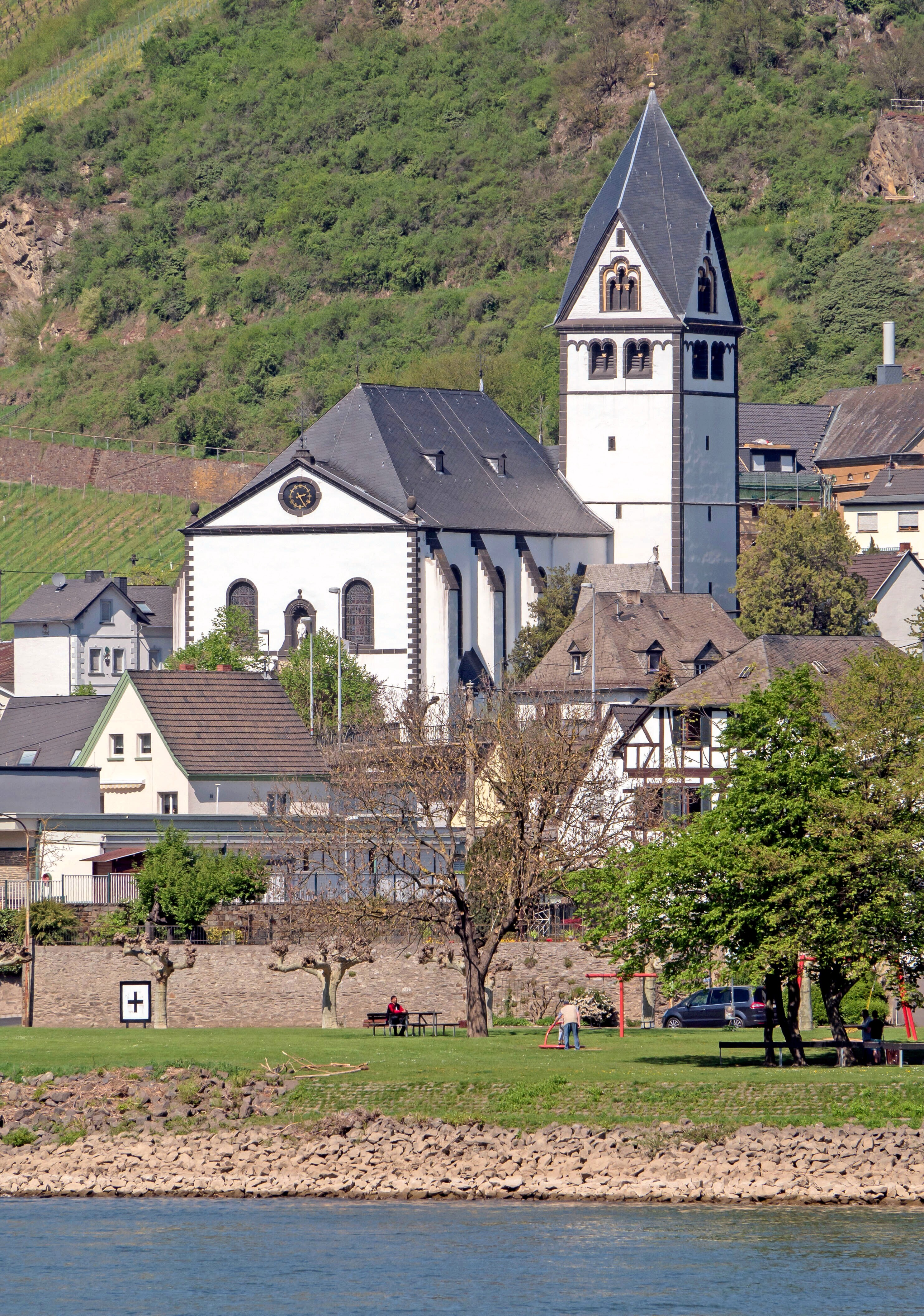 Der älteste Teil der katholischen Pfarrkirche St. Laurentius ist der um 1200 erbaute romanische Turm auf der Südseite mit dem für den Mittelrheinraum typischen Rhombendach. Der schlichte Saalbau entstand im frühen 18. Jahrhundert.